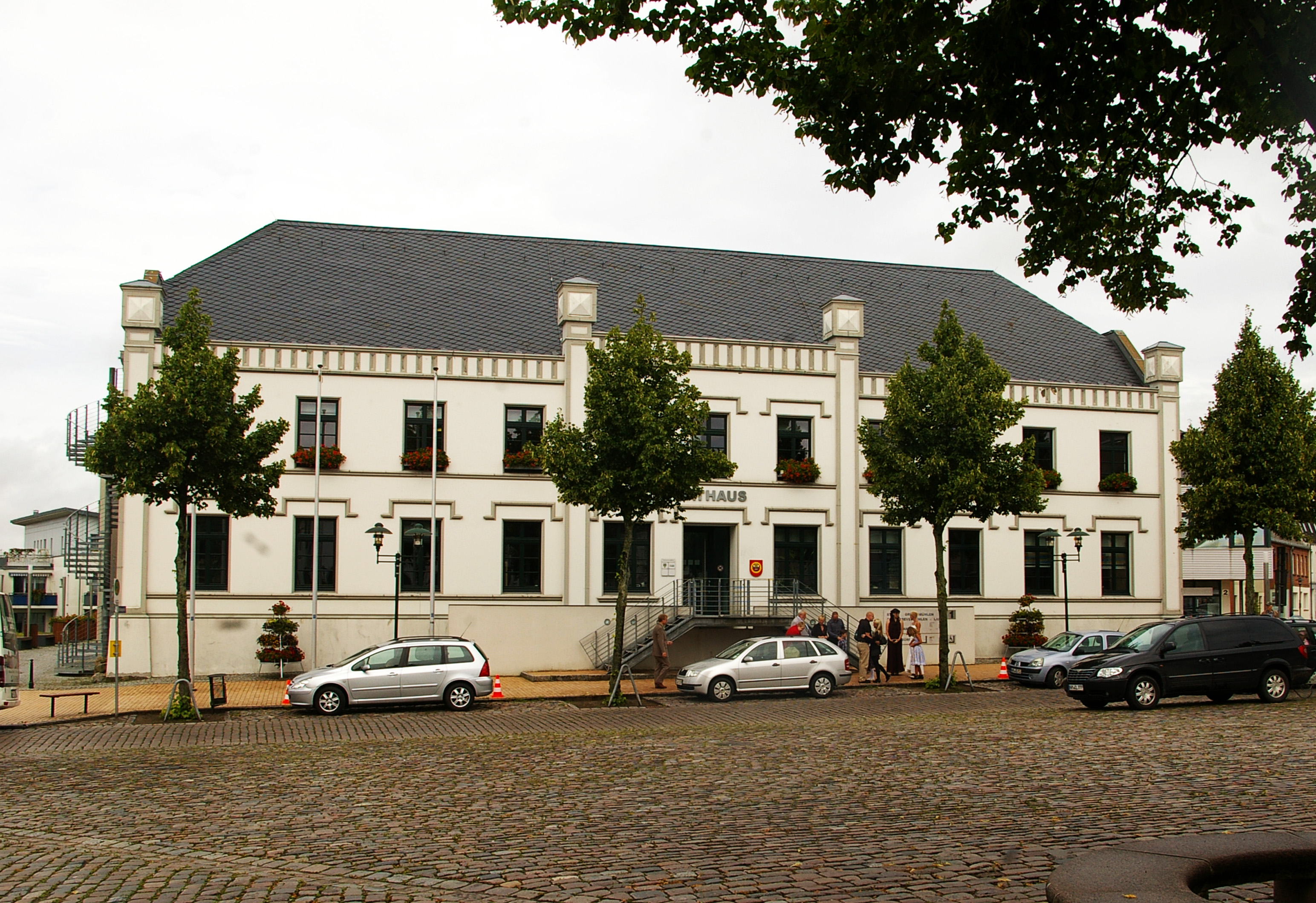 Rathaus in Grevesmühlen, Mecklenburg-Vorpommern